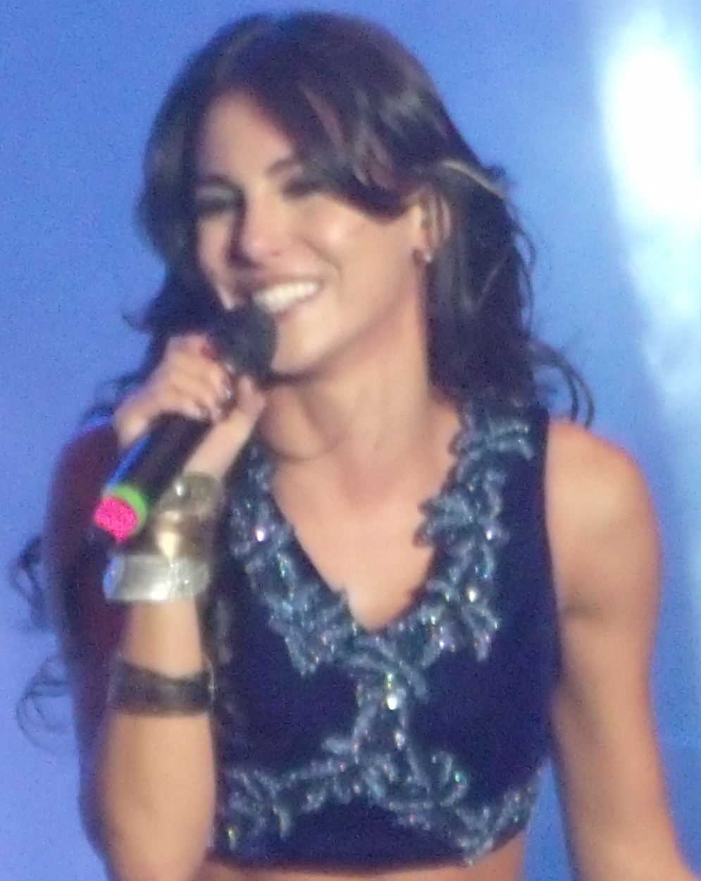 Mel no show de Porto Alegre!